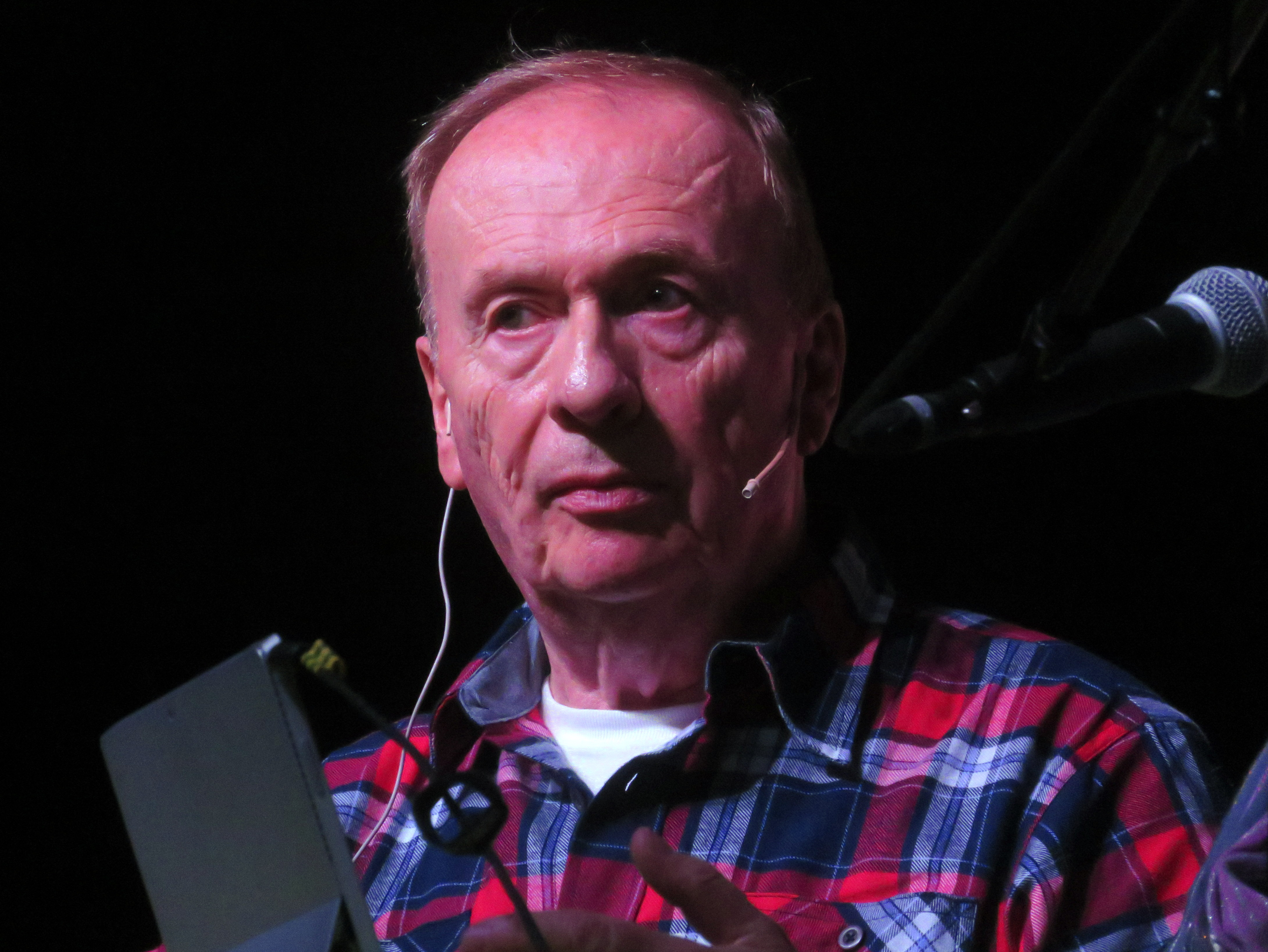 Beatles Engineer, Beatles fest, Mons, Belgium